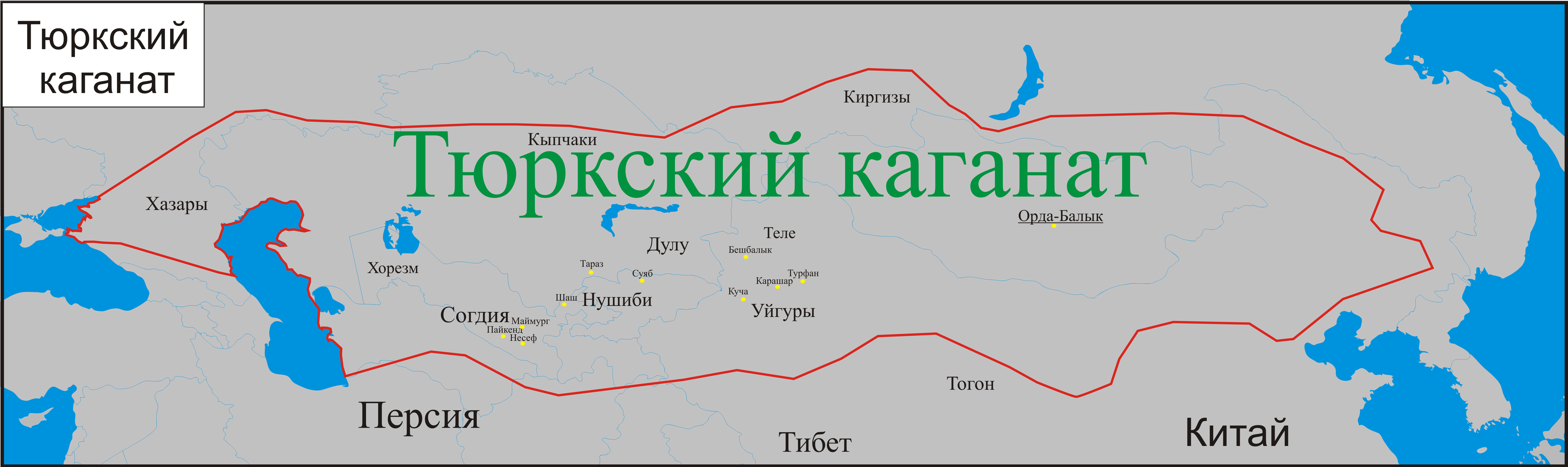 Карта Тюркского каганата в 600 году